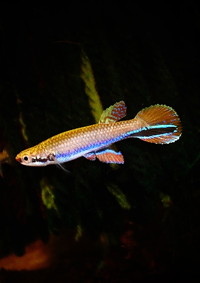 Laimosemion xiphidius